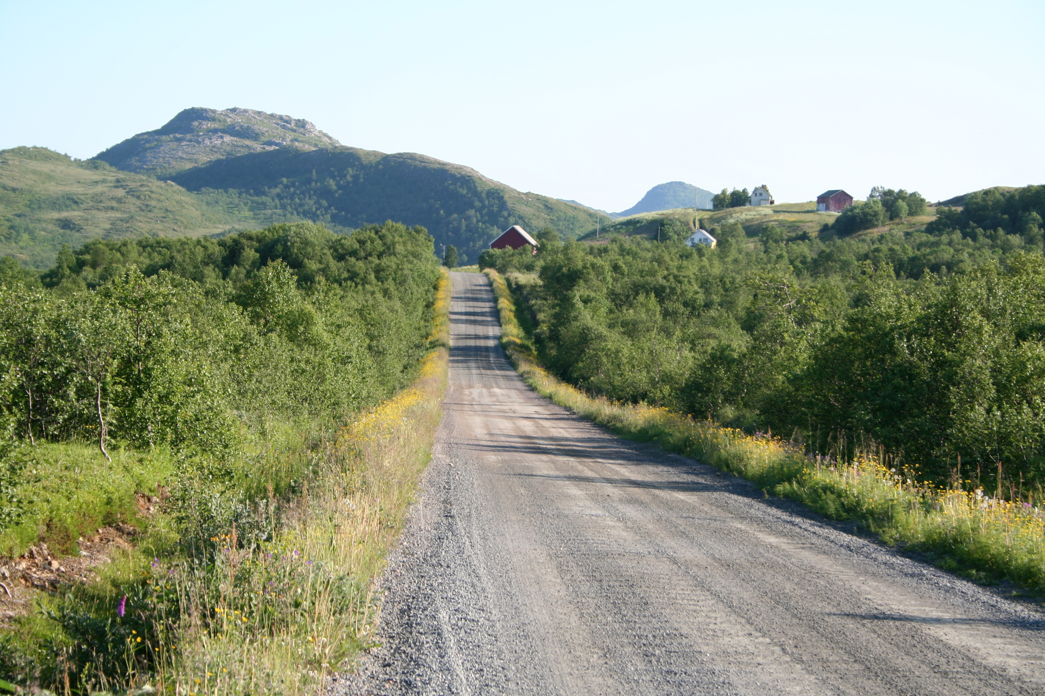 Road Fylkesvei 914 near Jørland in Bø (Nordland), Norway